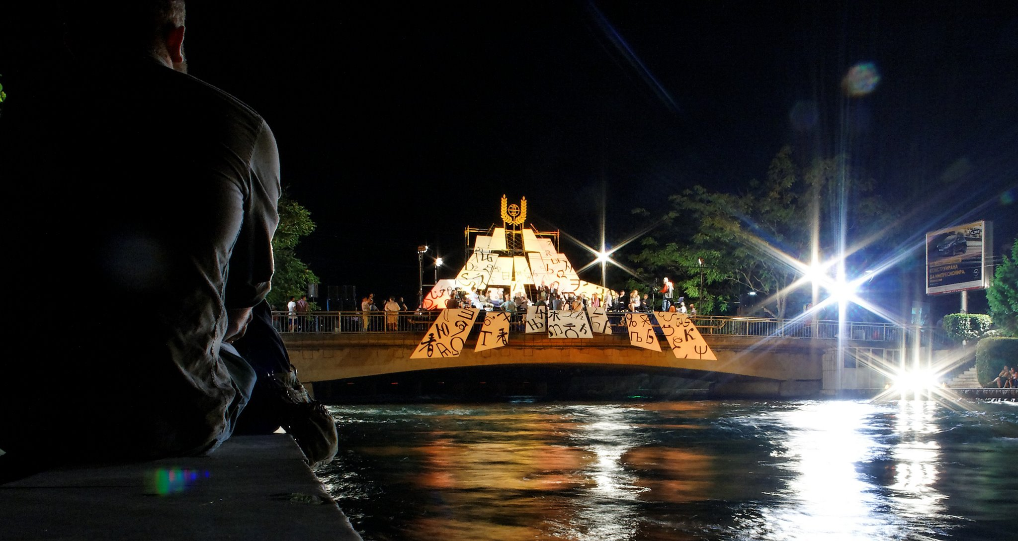 Struski Veceri na Poezijata 2013